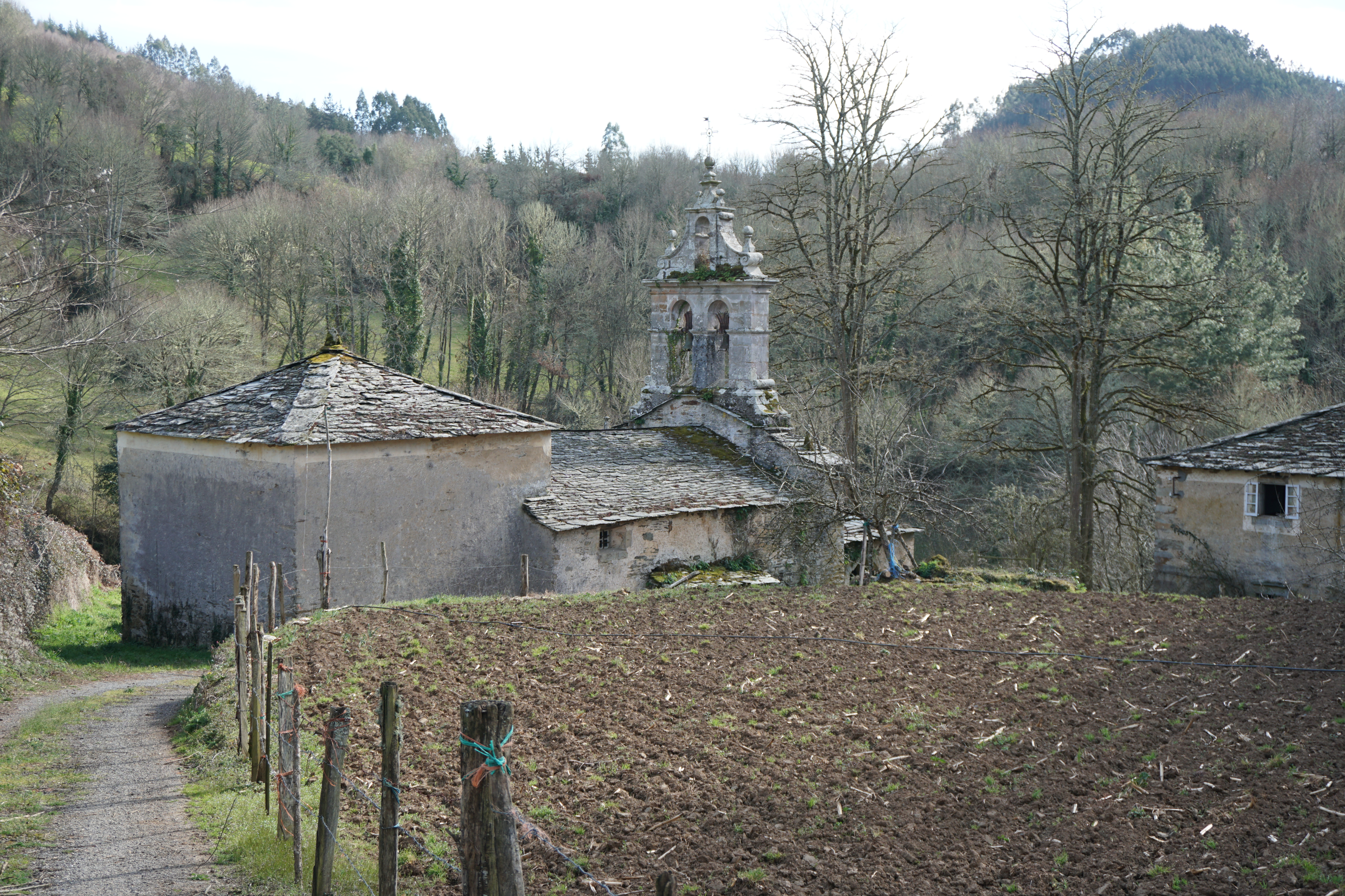 Carballido This is a photography of a Special Area of Conservation in Spain with the ID: ES1120006. Natura2000 entry, EEA entry